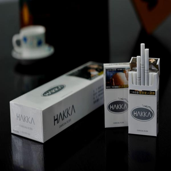 Hakka Silver Cigarette Packs